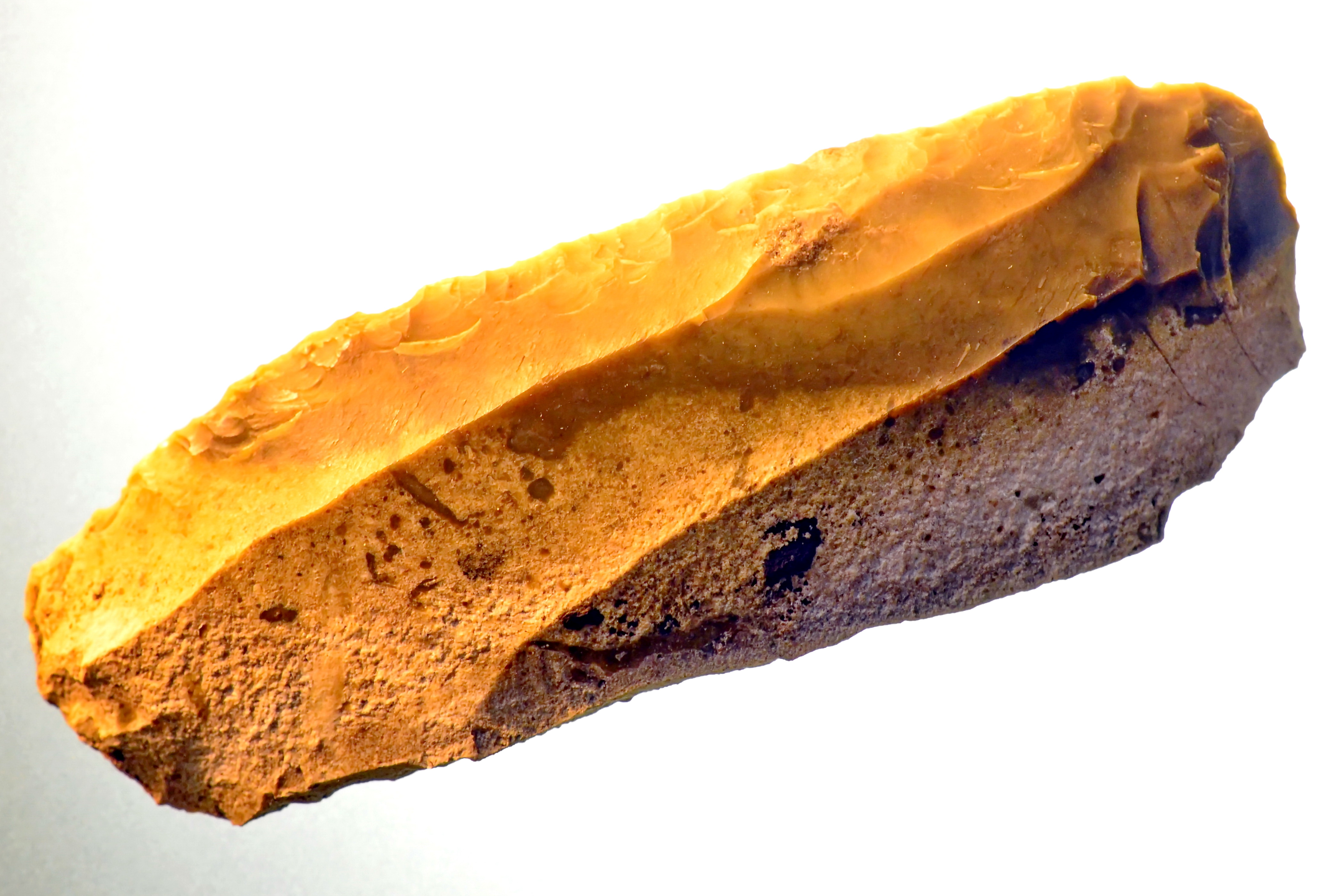 Ausstellung Archäologie im Parkhaus Opèra, Exponat aus der Grabung Parkhaus Opéra in Zürich (Switzerland) : Silexklinge der Horgener Kultur